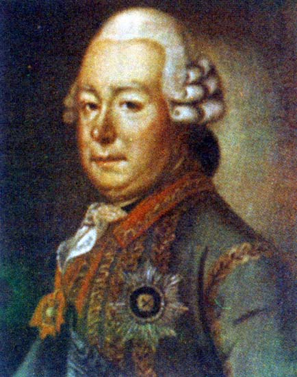 Aleksandr Mikhailovich Golitsyn, 1718-1783